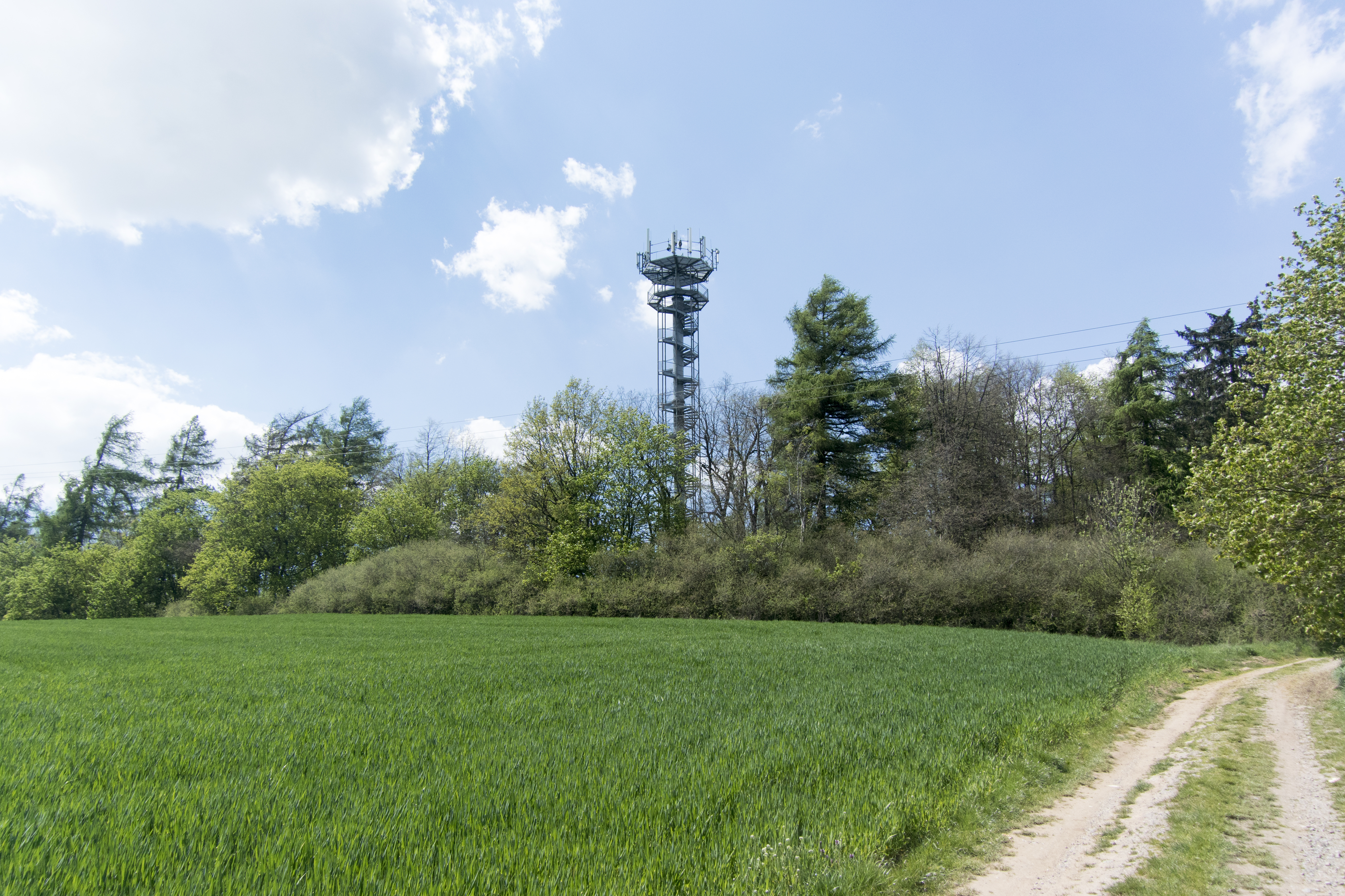 Foceno 7.5.2016